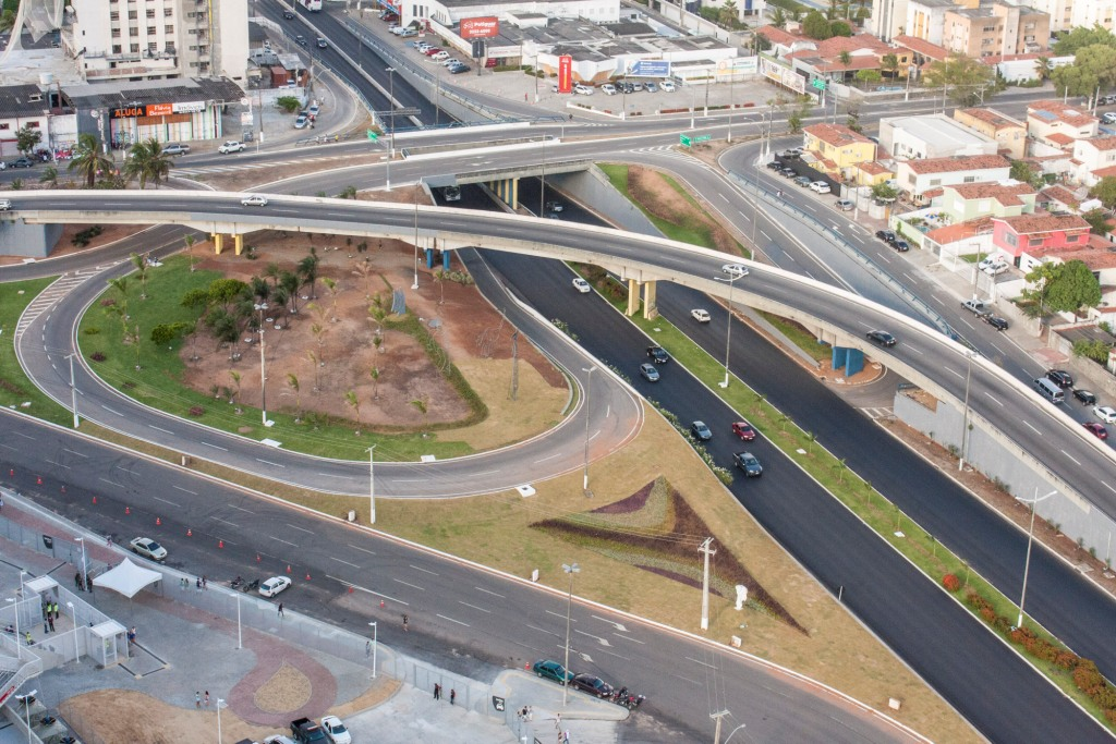 Complexo Quarto Centenário, em Natal, Brasil, inaugurado em 2000, em comemoração aos 400 anos de fundação da cidade.